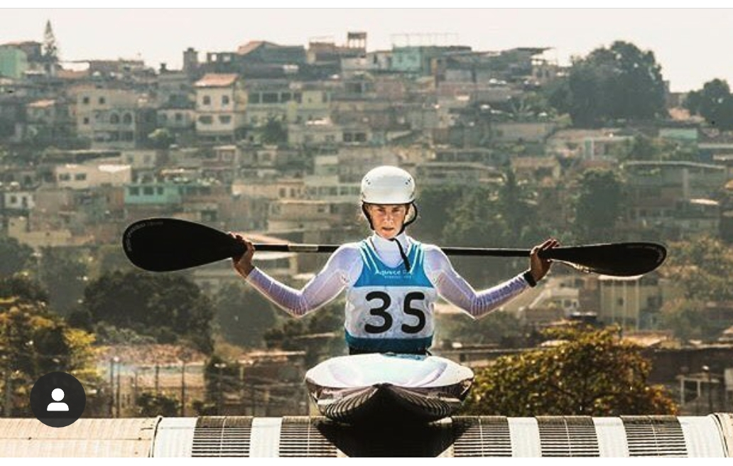 Rio de Janeiro